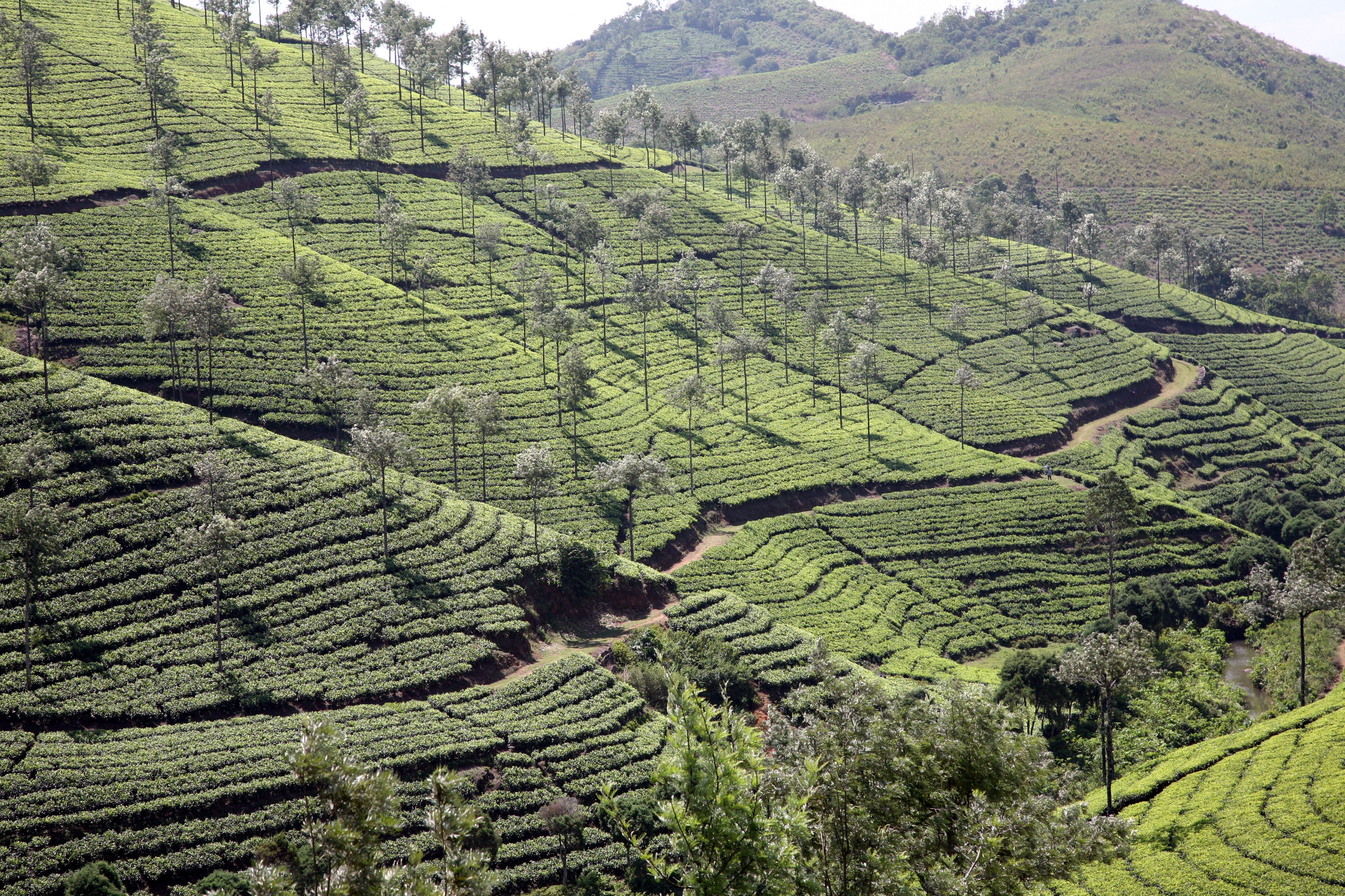 Tea plantation in Pambanar, Kerala.